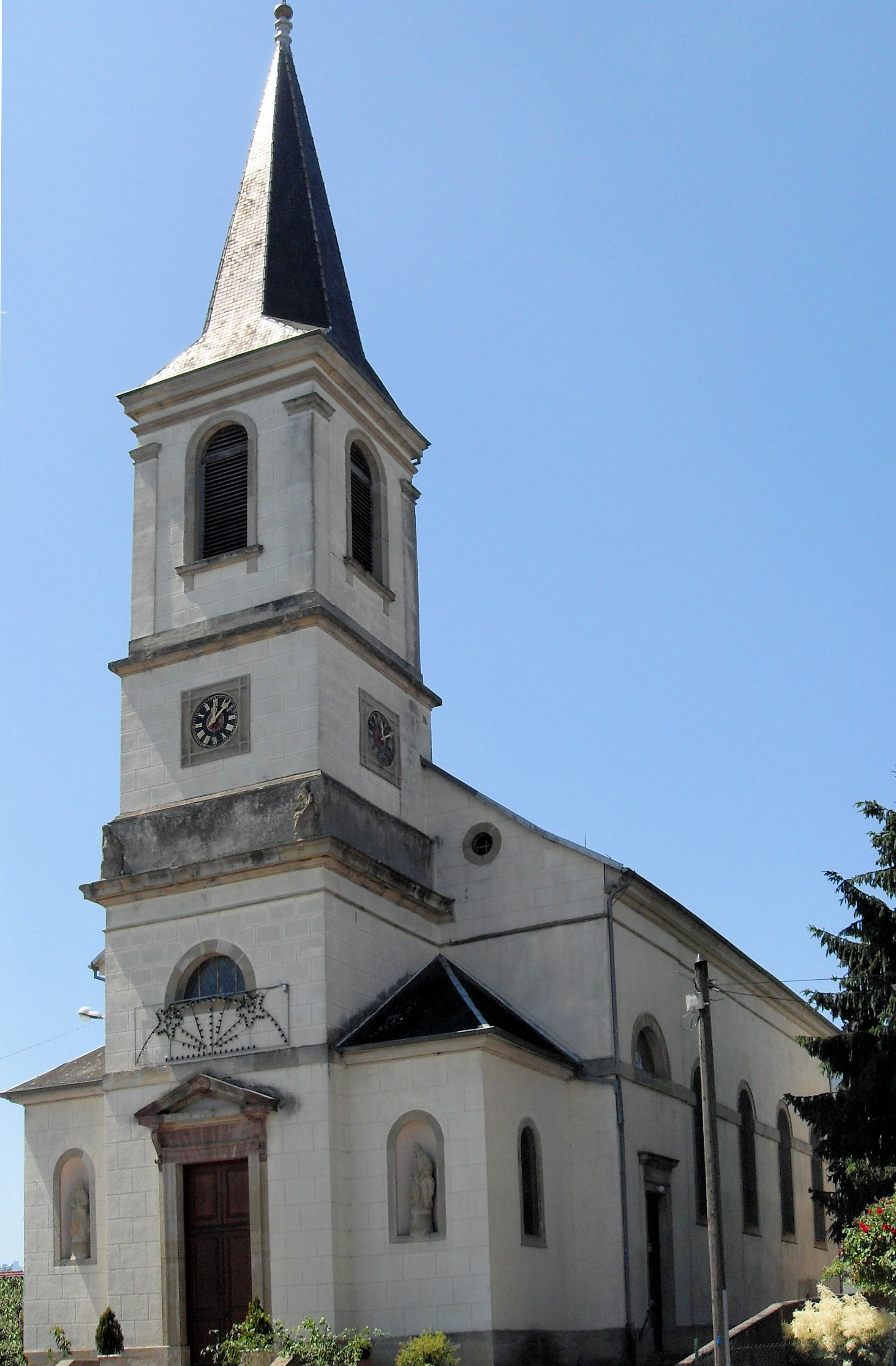 L'église Saint-Augustin à Spechbach-le-BasHaut